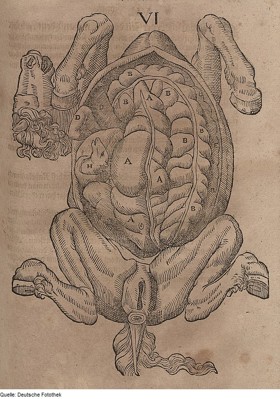 Original image description from the Deutsche Fotothek Biologie & Veterinärmedizin & Pferd & Organ